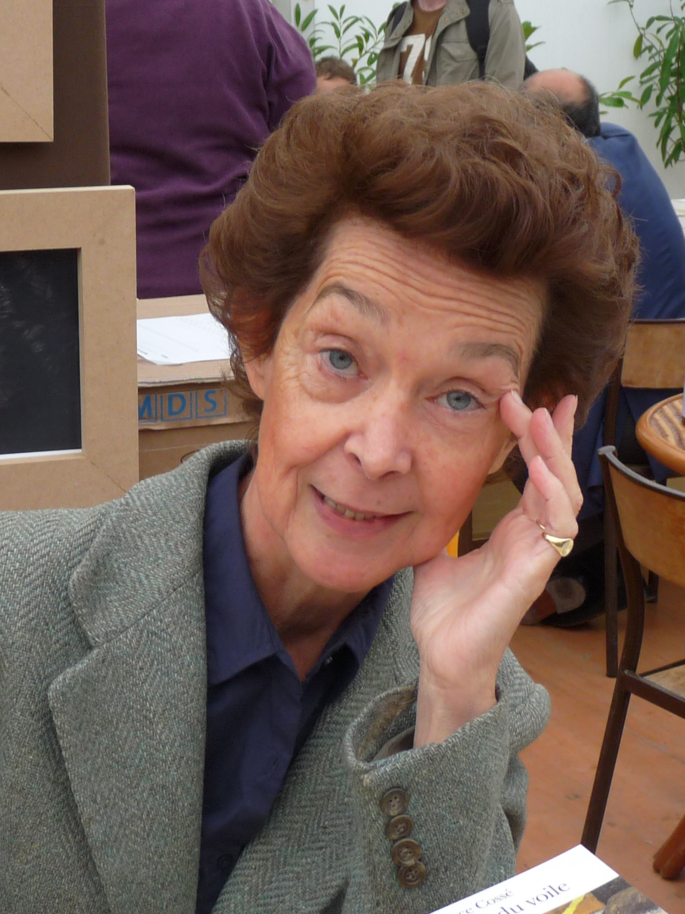 Laurence Cossé en dédicace dans le cadre du "Livre sur la Place", Nancy, septembre 2011